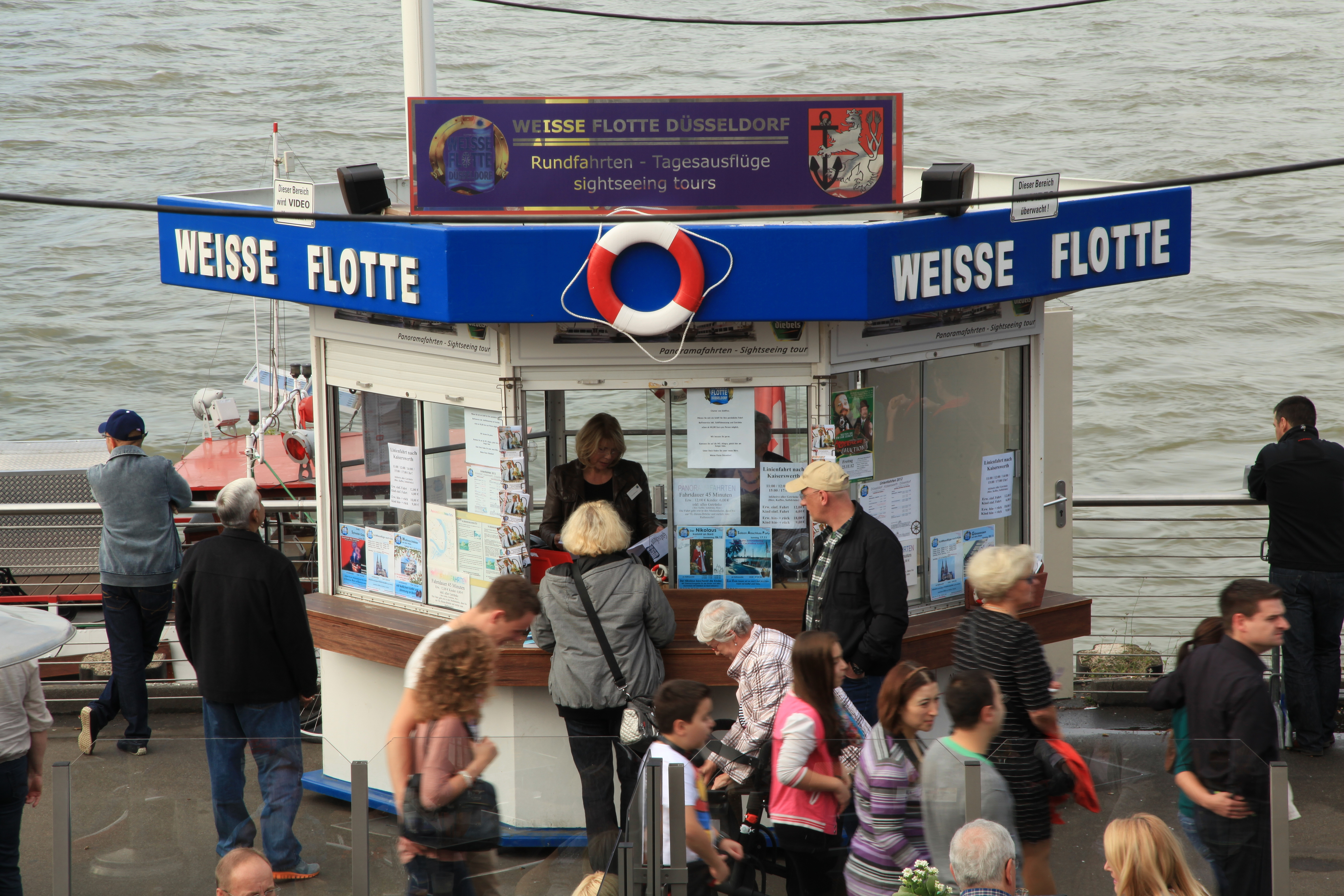 Unteres Rheinwerft in Düsseldorf